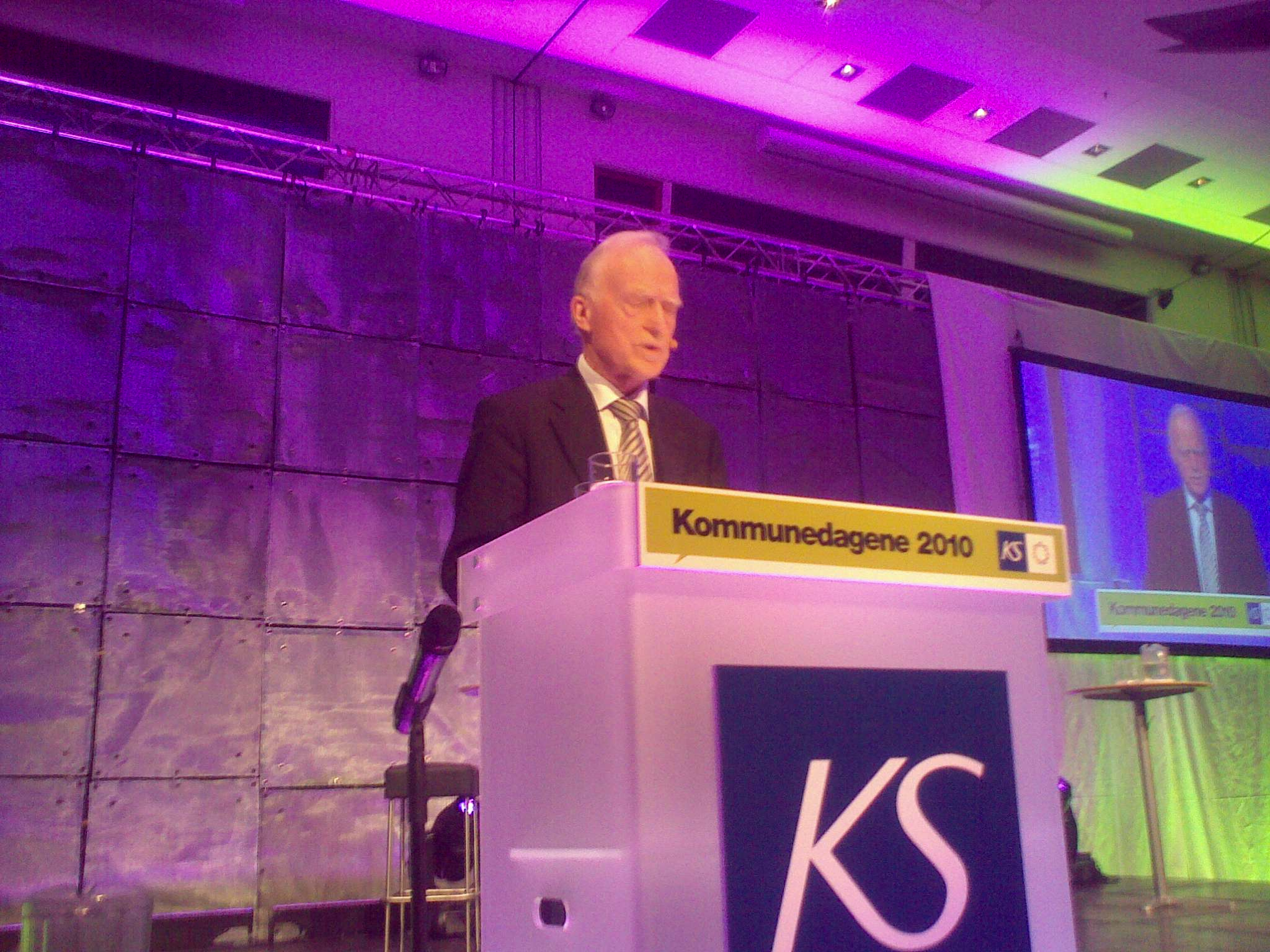 kS-leder Halvdan Skard snakker om behovet for � �ke skattene p� litt lenger sikt for � sikre god eldreomsorg, skole og barnevern, kort sagt god velferd. Andelen av verdiskapningen som g�r til offentlige tjenester har g�tt ned frem til den R�dgr�nne regjeringen overtok og sp�rsm�let er om den offentlige velferden skal holde tritt med den privalte rikdomsveksten de aller fleste av oss opplever.